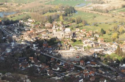 Arques la bataille du ciel Auteur : Dominique Pilon - Habitant du village site d'origine Photographe Dominique Pilon : cette oeuvre est libre, vous pouvez la redistribuer et/ou la modifier selon les termes de la GFDL Dominique Pilon